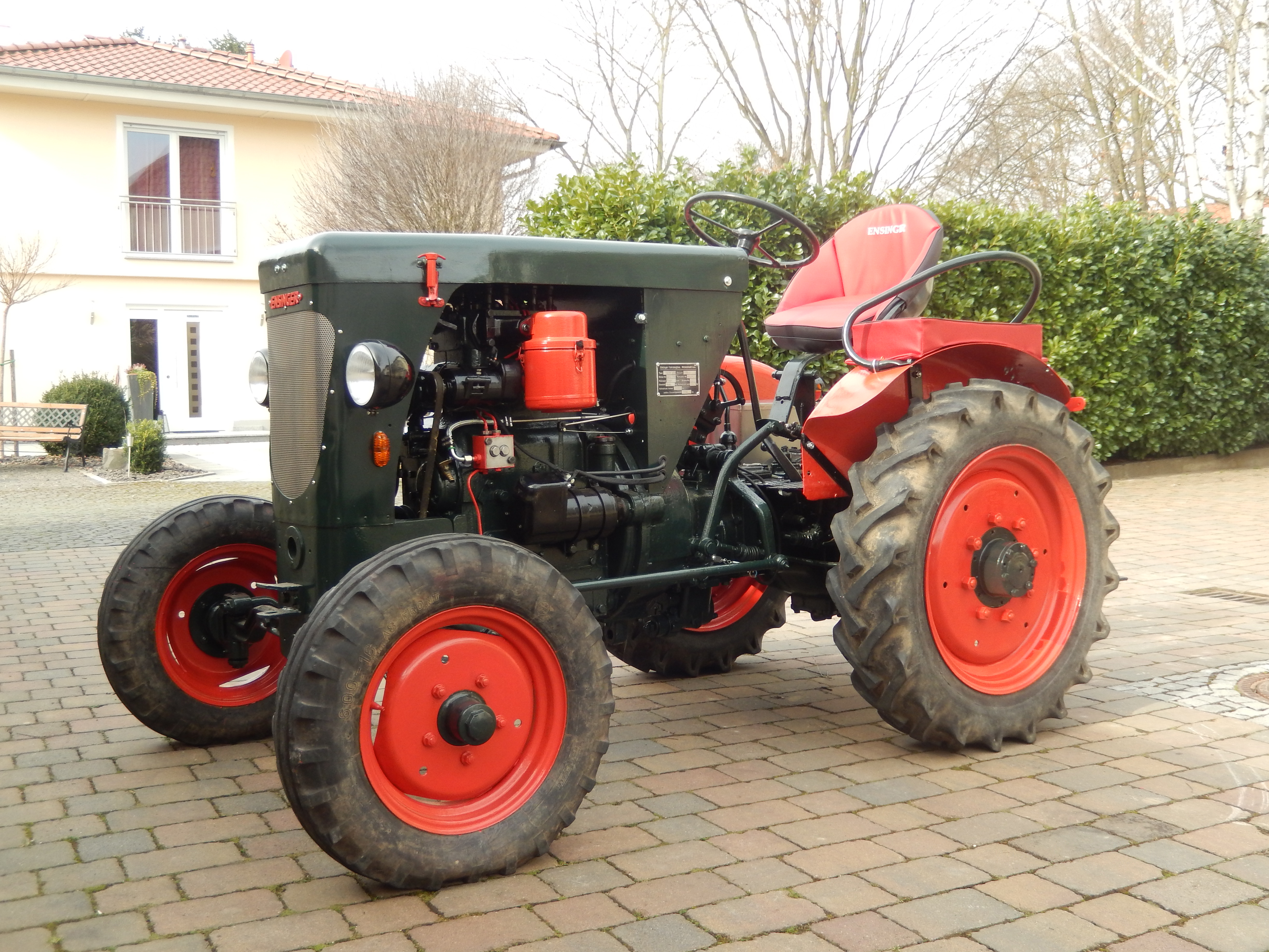 Ensinger AS 20 I mit MWM 2 Zyl KDW415Z, restauriert